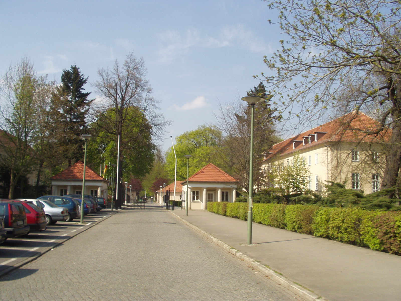 Eingang zur Bundesakademie für Sicherheitspolitik in Berlin-Pankow.